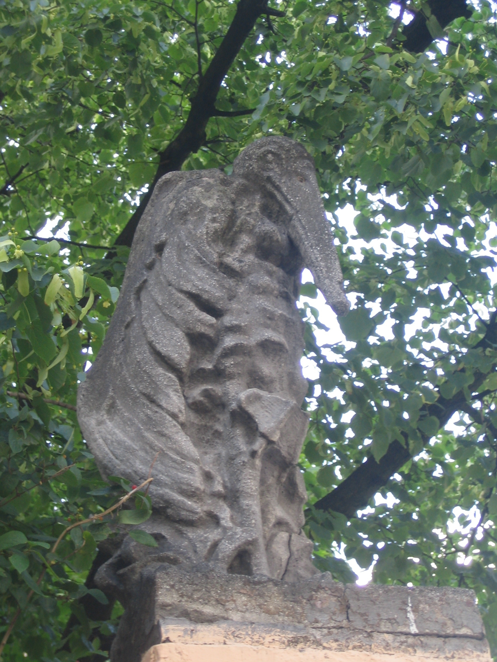 Rzeźba z ogrodzenia Ogrodu Zoologicznego w Poznaniu autorstwa Edwarda Haupta